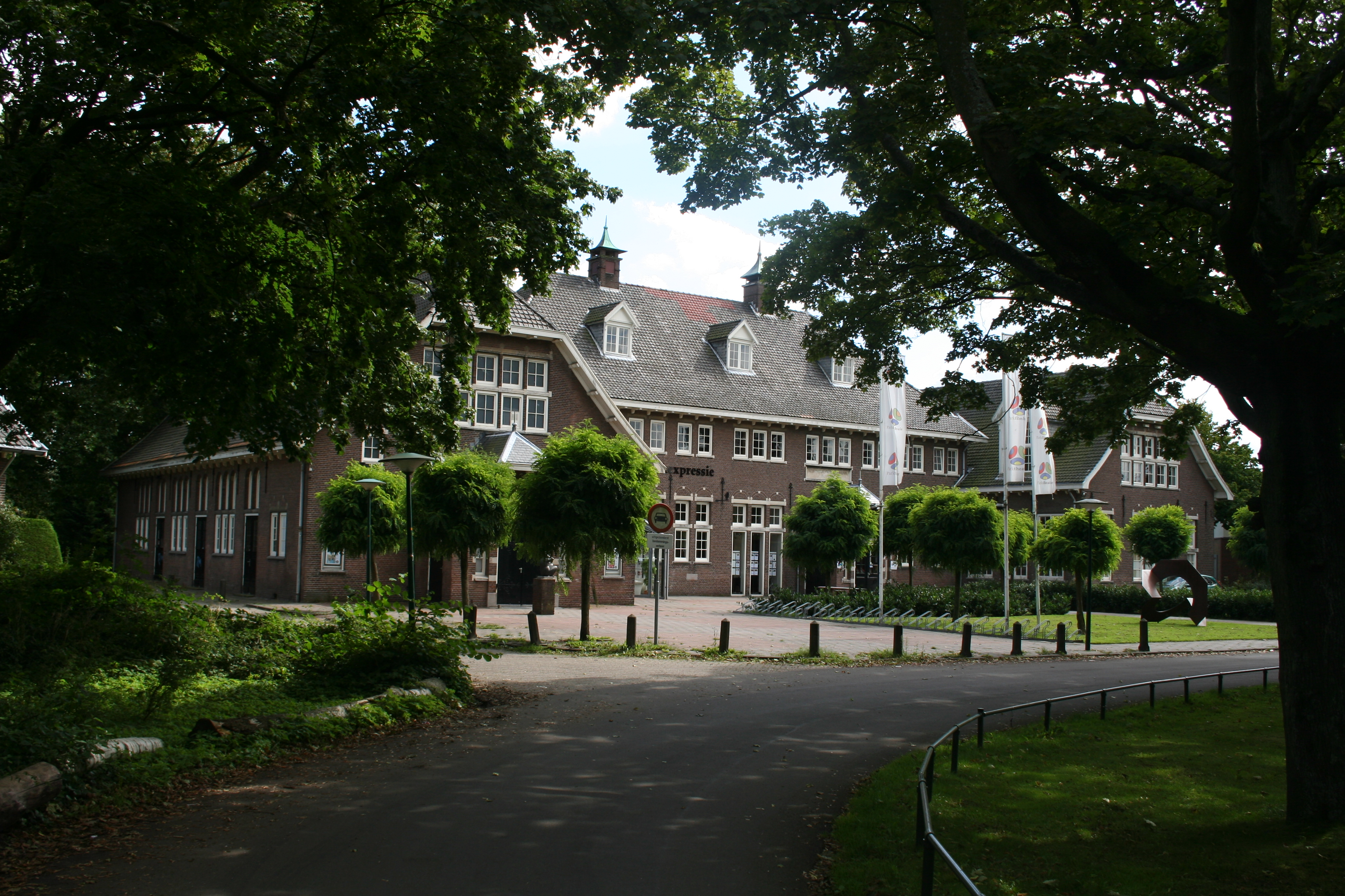 Wilhelminaschool te Alphen aan den Rijn